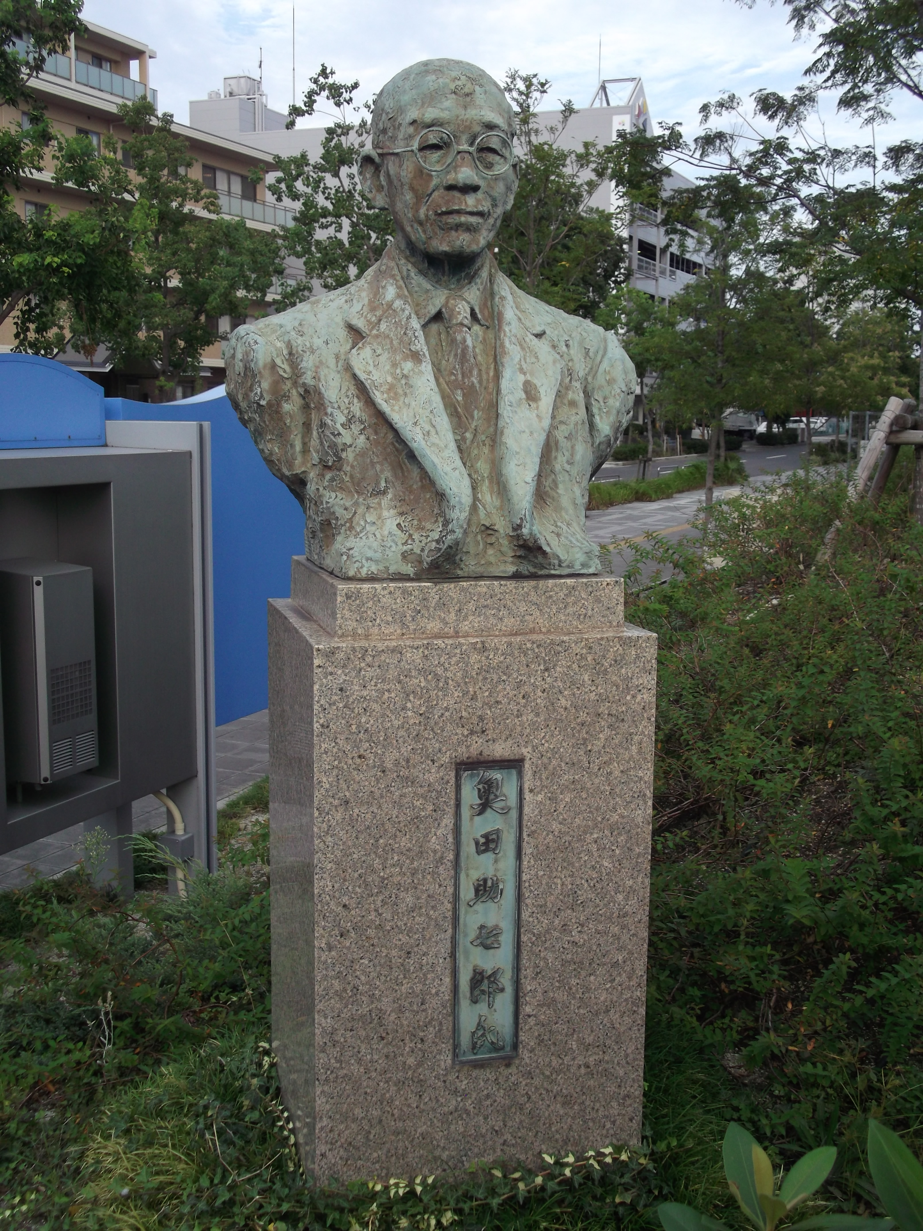 名古屋市港区名古屋港ガーデンふ頭地区に設置されている「奥田助七郎氏像」